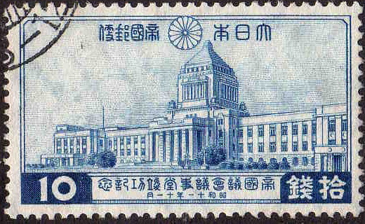 当時の「帝国議会議事堂」、現在の国会議事堂の完成記念切手のうち10銭切手